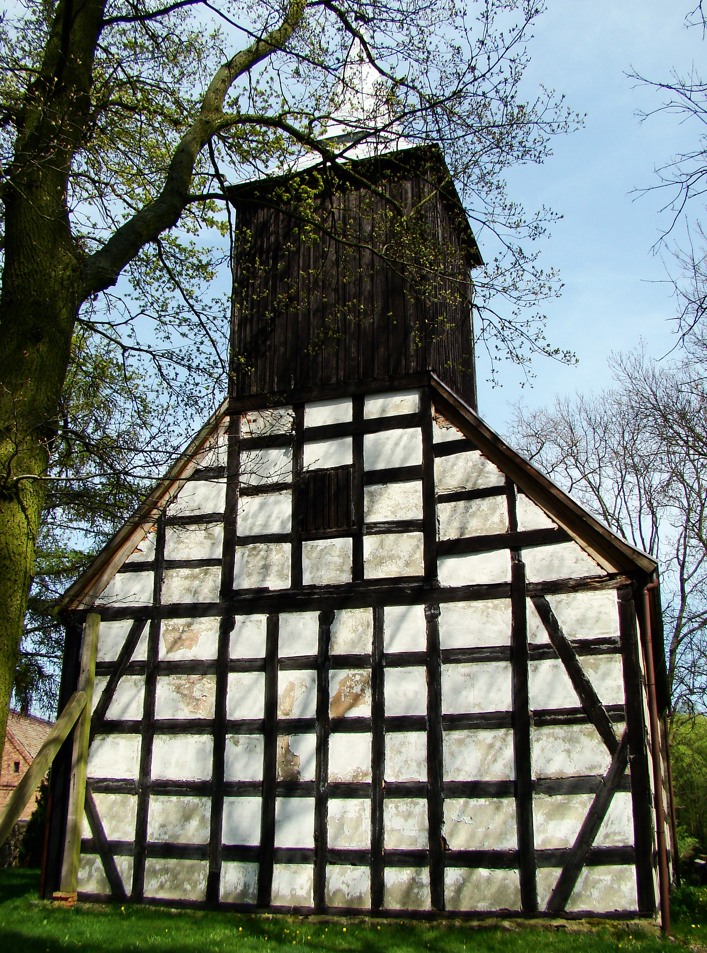 Kościół p.w. Św. Pawła w Tatyni, (Gmina Police, Powiat policki, Województwo zachodniopomorskie), Polska